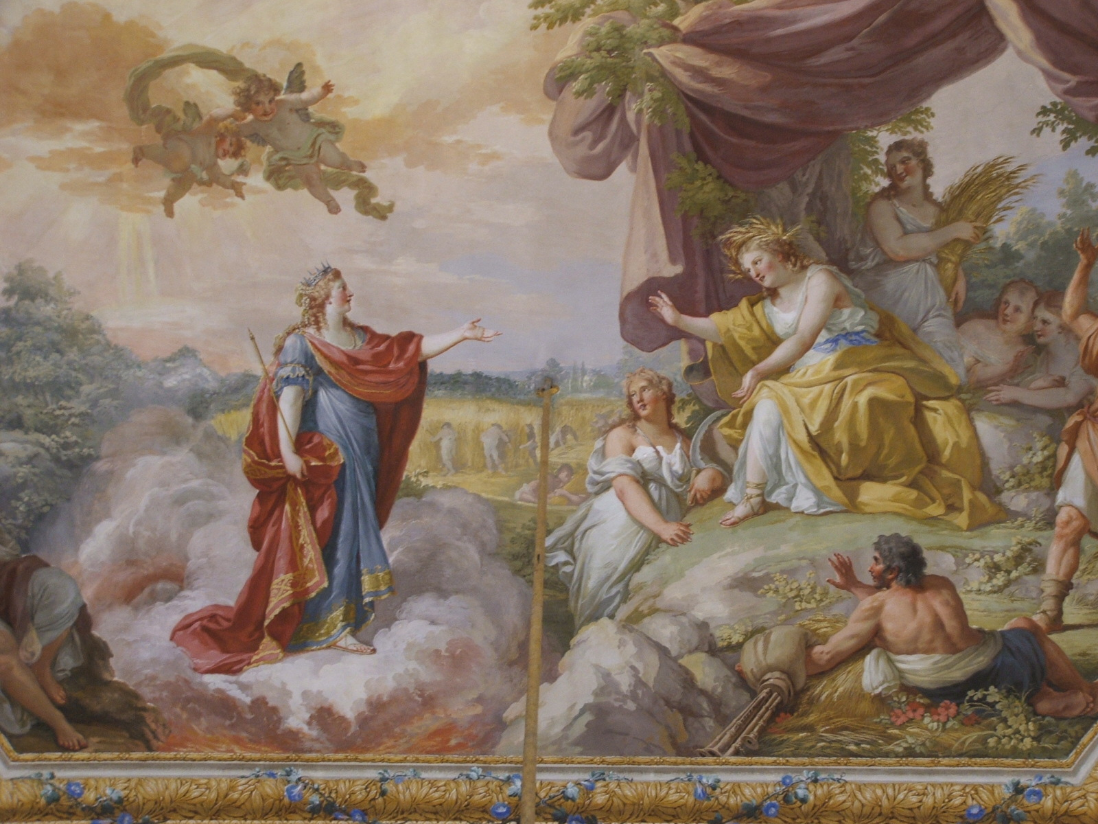 Caserta, immagini dalla Reggia di Caserta Affresco